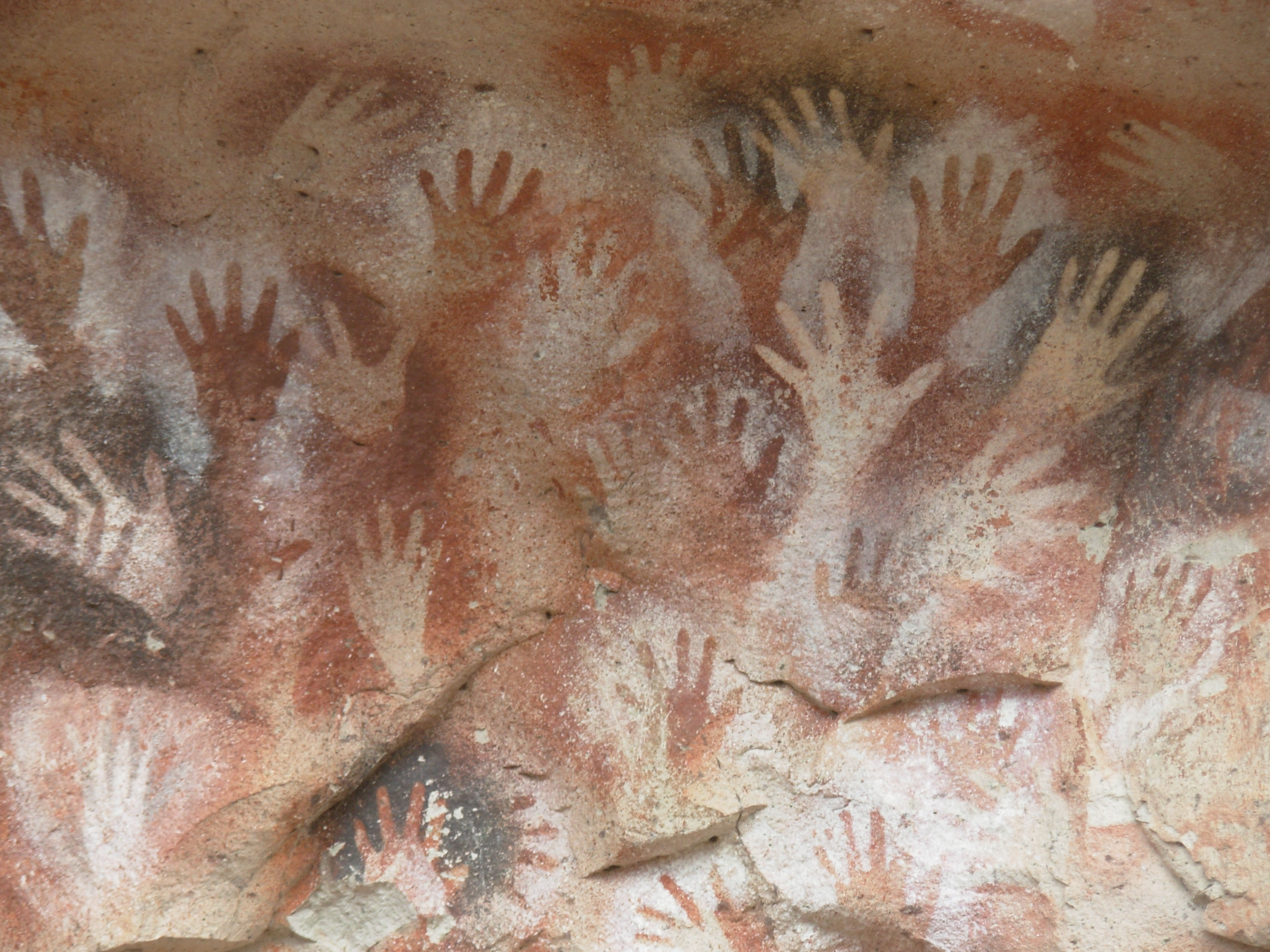 Patagonia Argentina